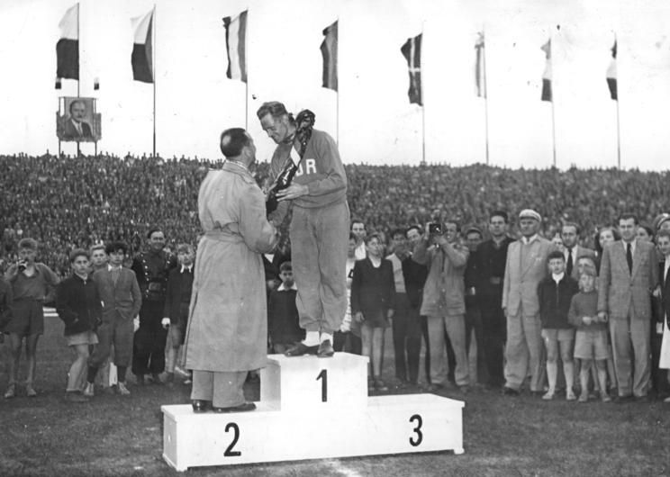 VIII. Friedensfahrt, Gustav-Adolf Schur Zentralbild CAF-V So-Ku 18.5.1955 - Die VIII. Internationale Friedensfahrt Prag-Berlin-Warschau beendet. UBz: Gustav Adolf Schur (DDR), der Sieger in der Gesamteinzelwertung, im Warschauer Stadion während der Siegerehrung.